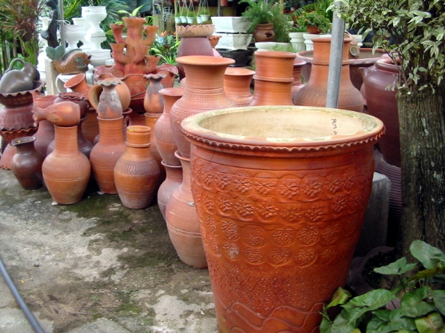 Nusantara-styled gardening of Sungai Buloh.